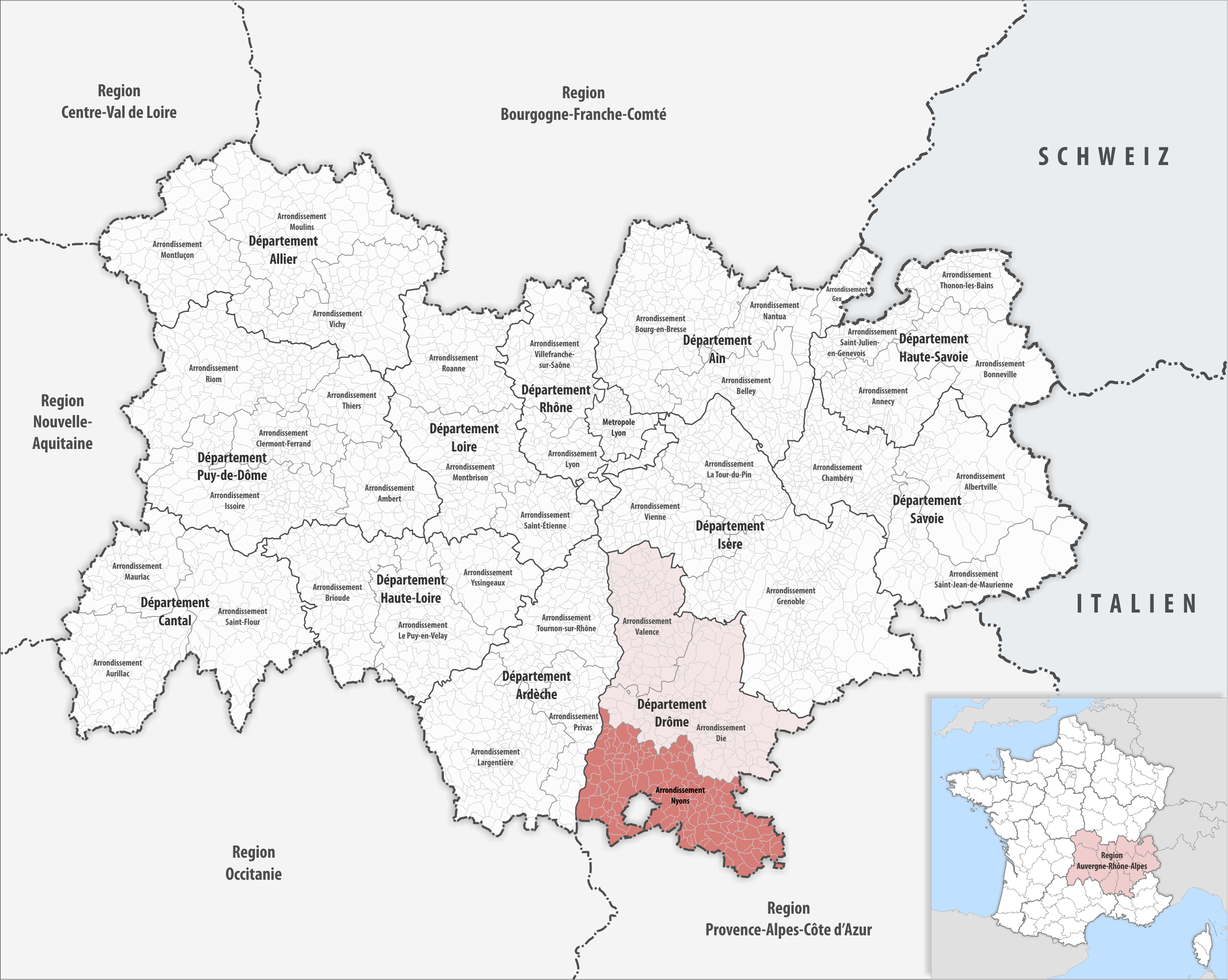 Lage des Arrondissements Nyons